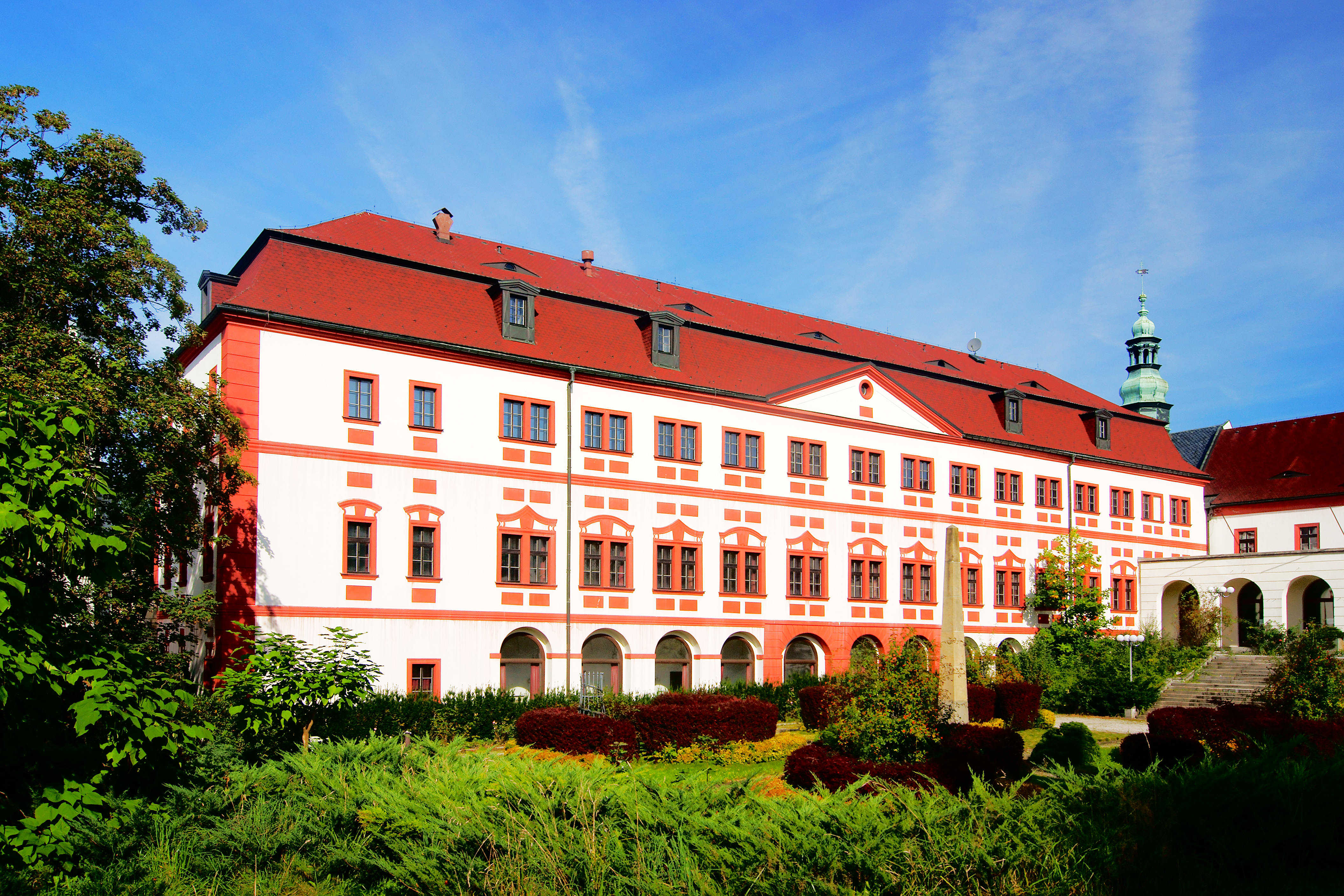 Barokně - klasicistní zámek v Liberci.